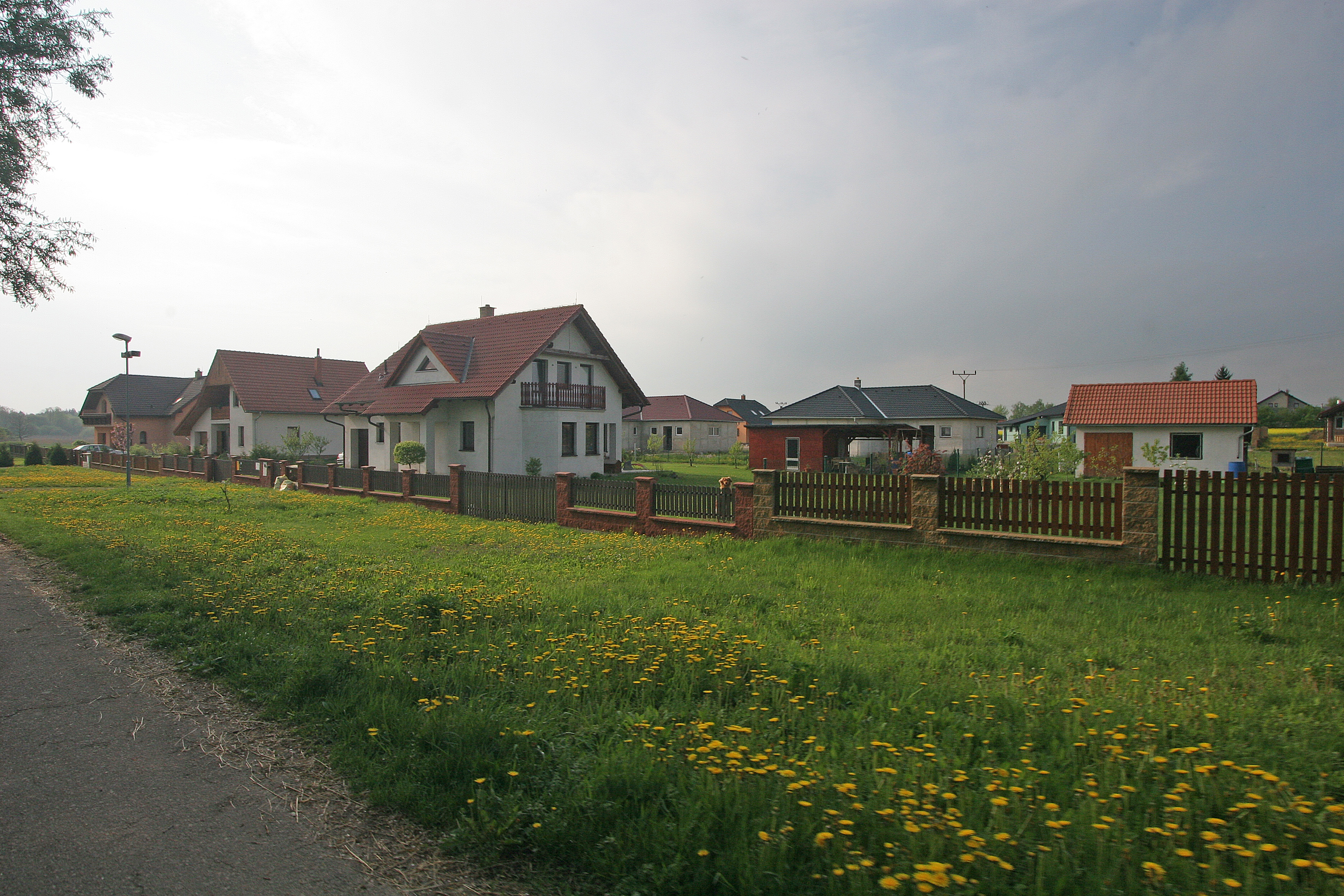 Voleč čp. 135, 134 a 136